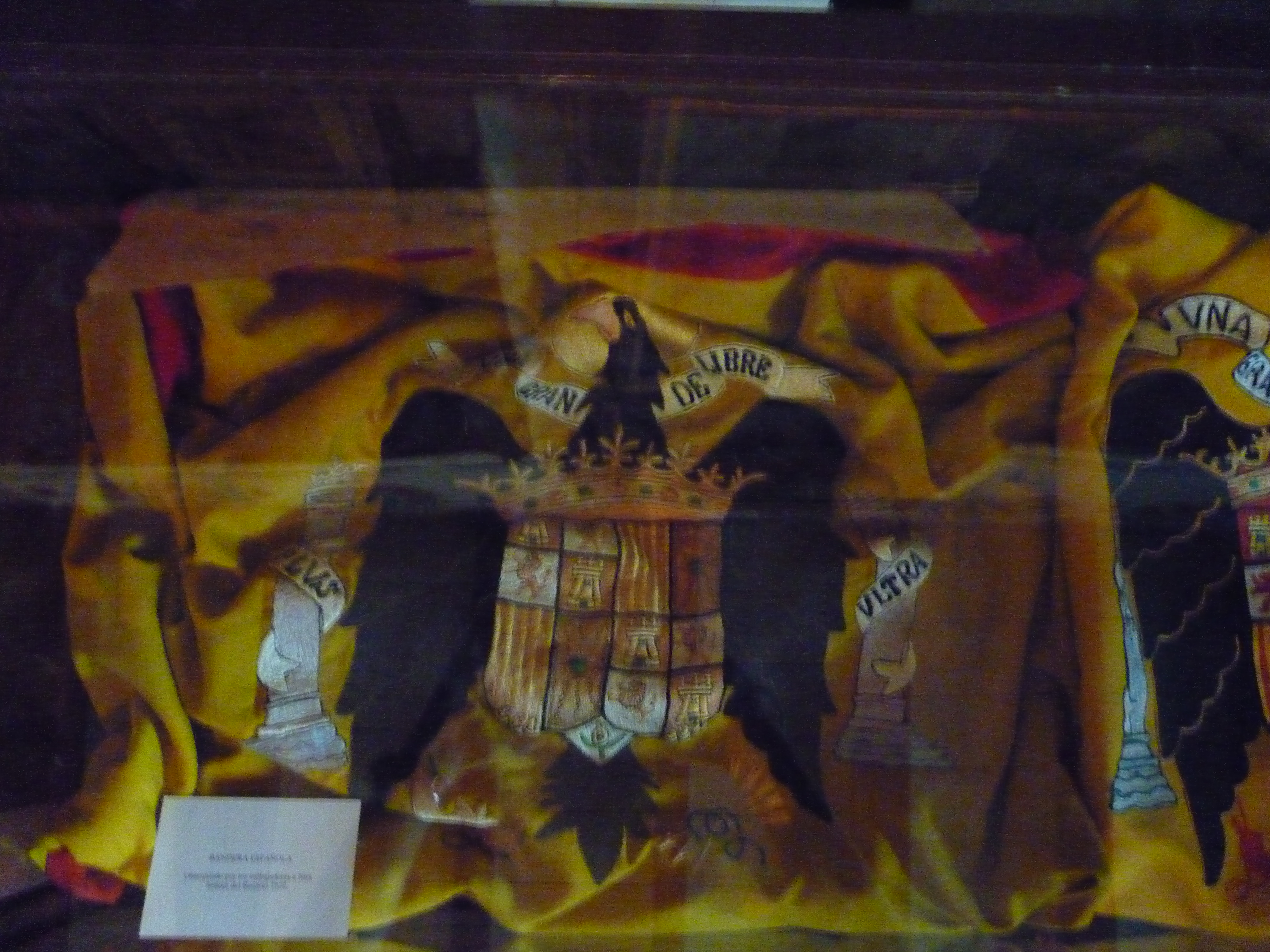 bandaera